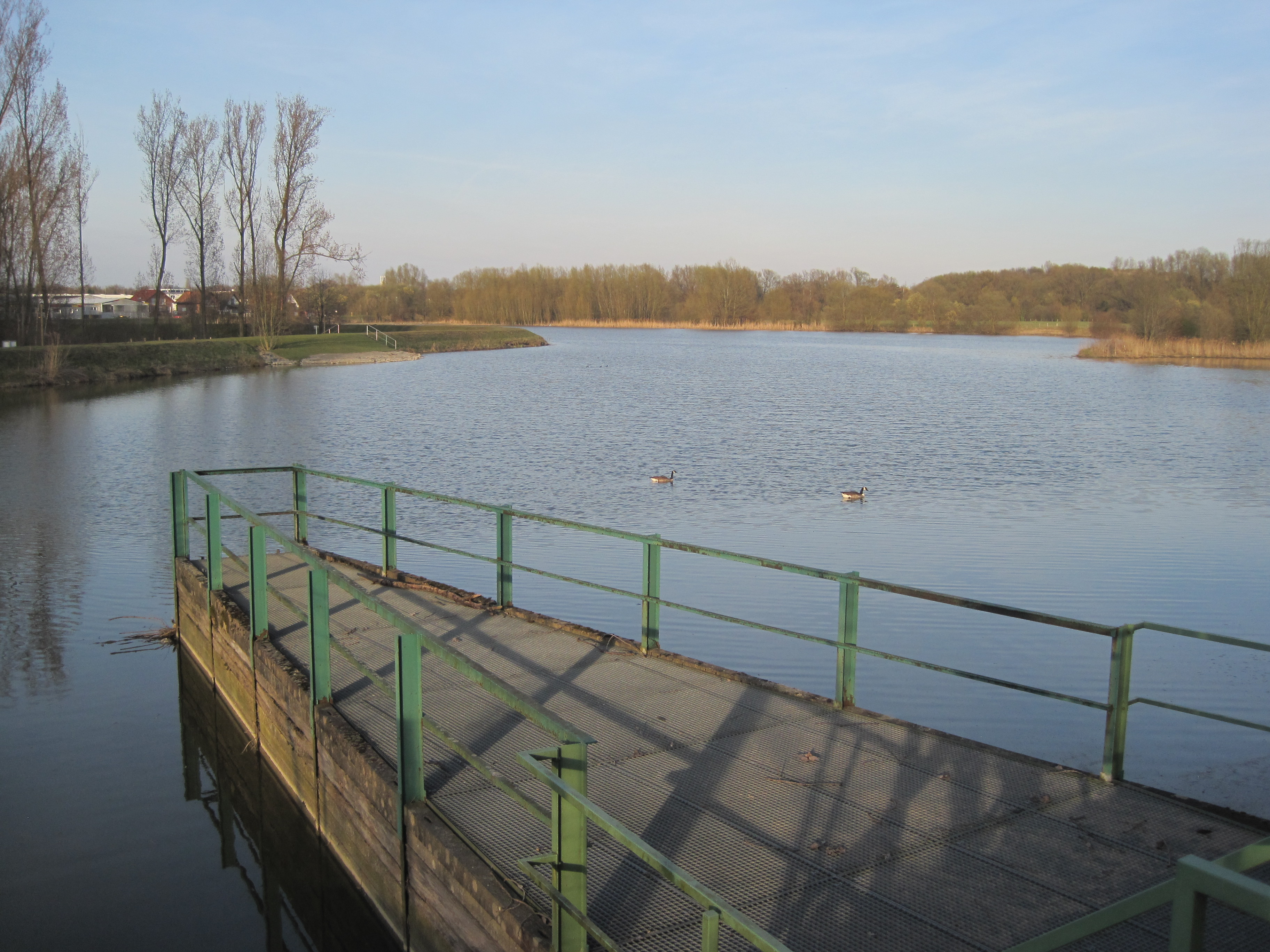 Das Foto zeigt den Radbodsee in Hamm-Bockum-Hövel.